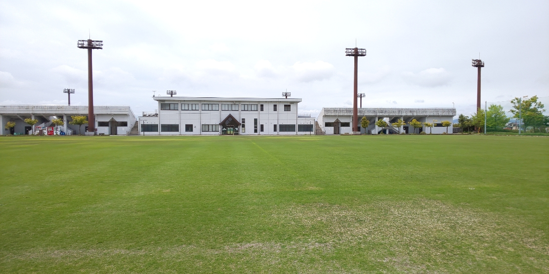 高岡スポーツコア